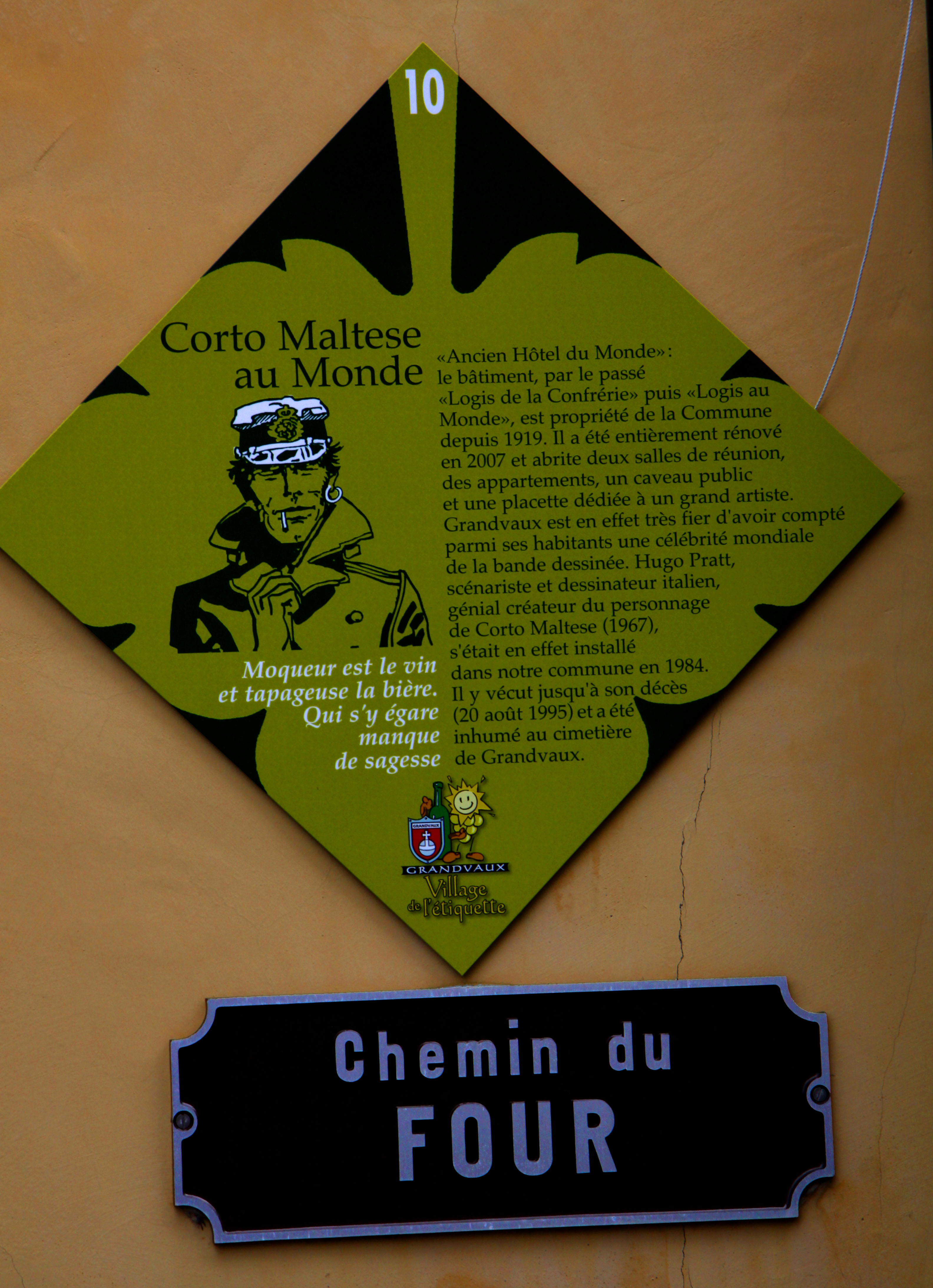 Grandvaux. Dans les rues du village.